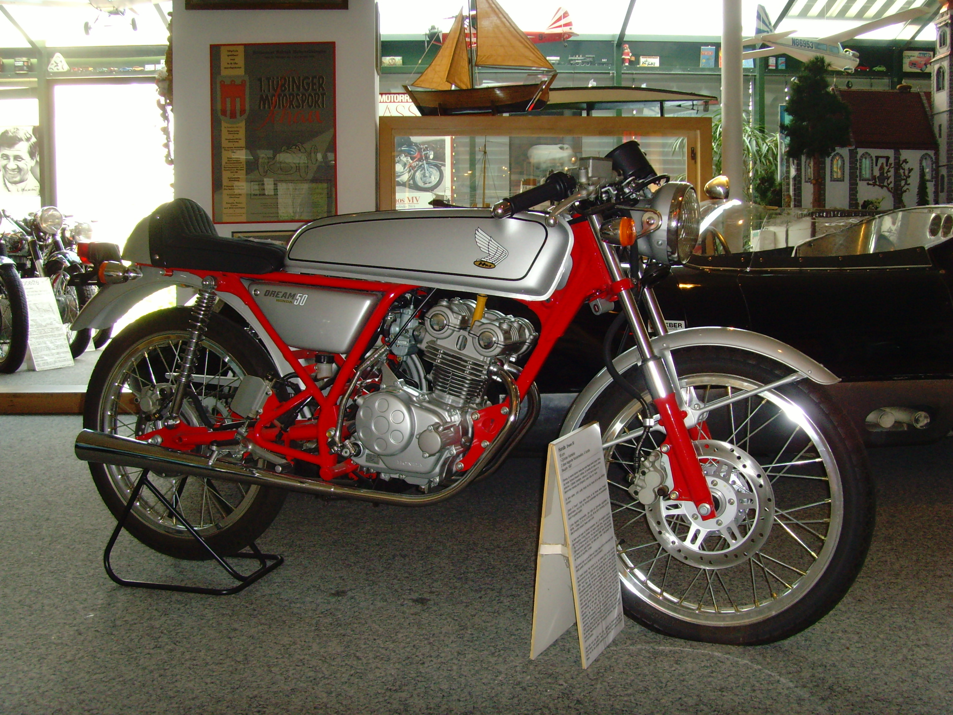 Honda Dream 50 @ Boxenstop Tübingen